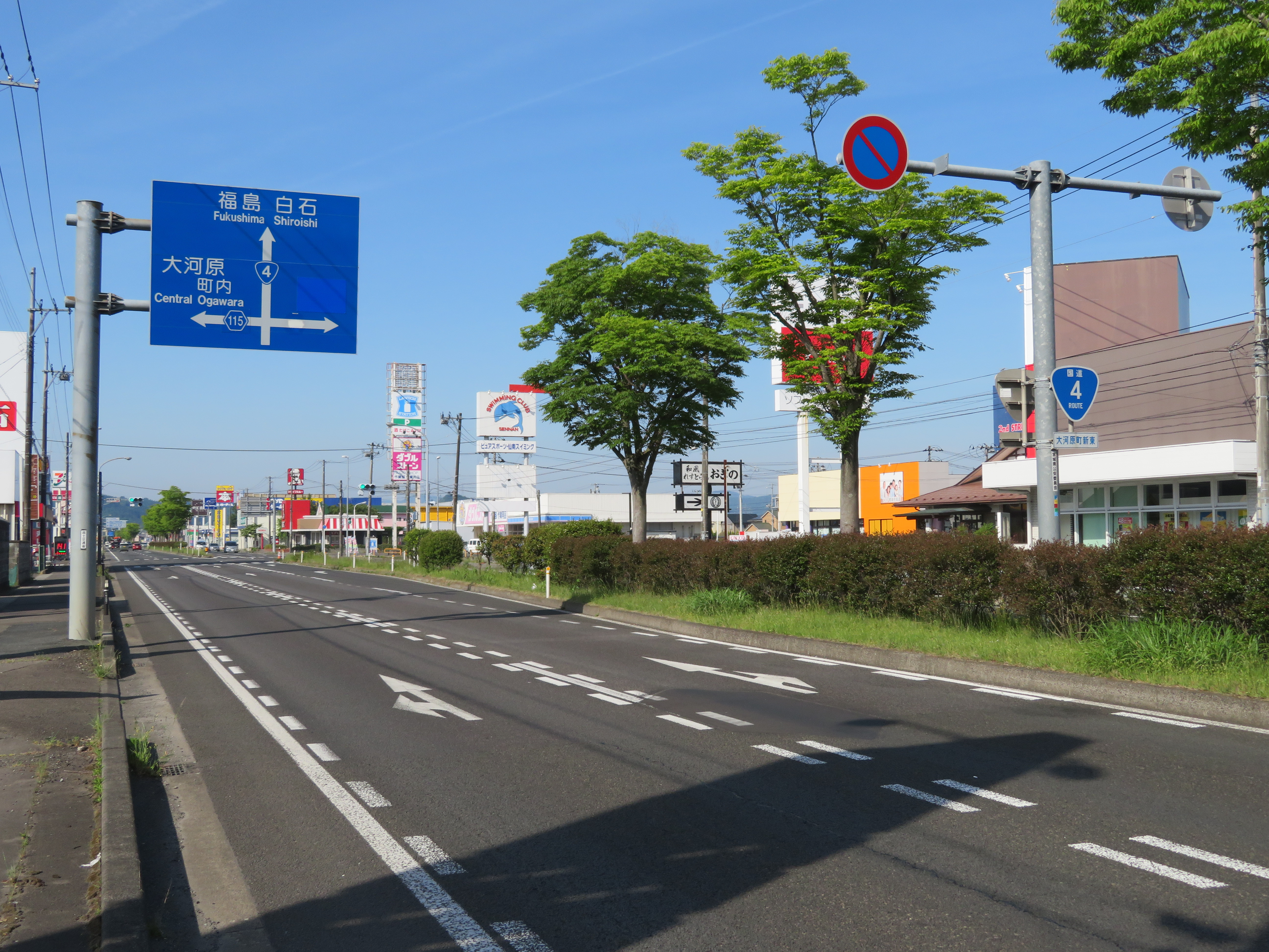 国道4号線 大河原バイパス 宮城県柴田郡大河原町新東付近（白石方面を撮影） Canon PowerShot SX720 HS